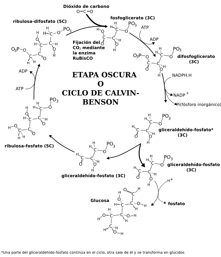 Ciclo de Calvin-Benson o etapa oscura de la fotosíntesis